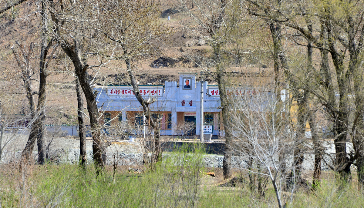 금생역（金生驛）